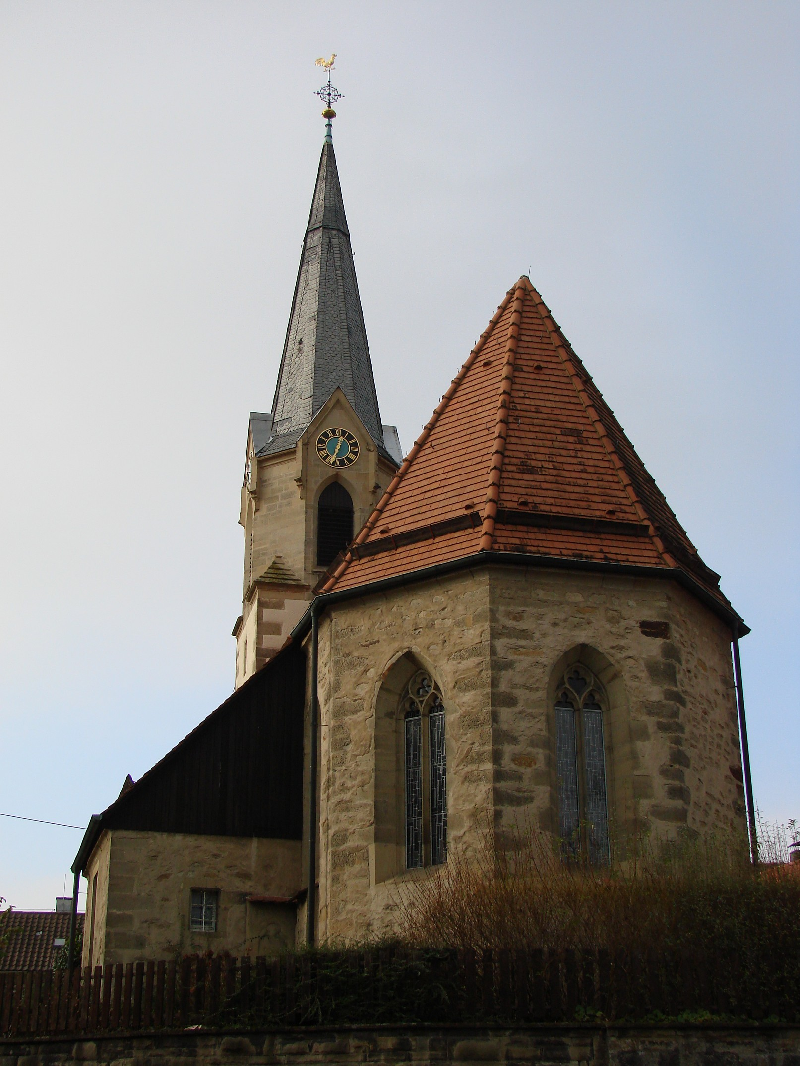 Freiberg am Neckar, Nikolauskirche, built in 1447 and 1521